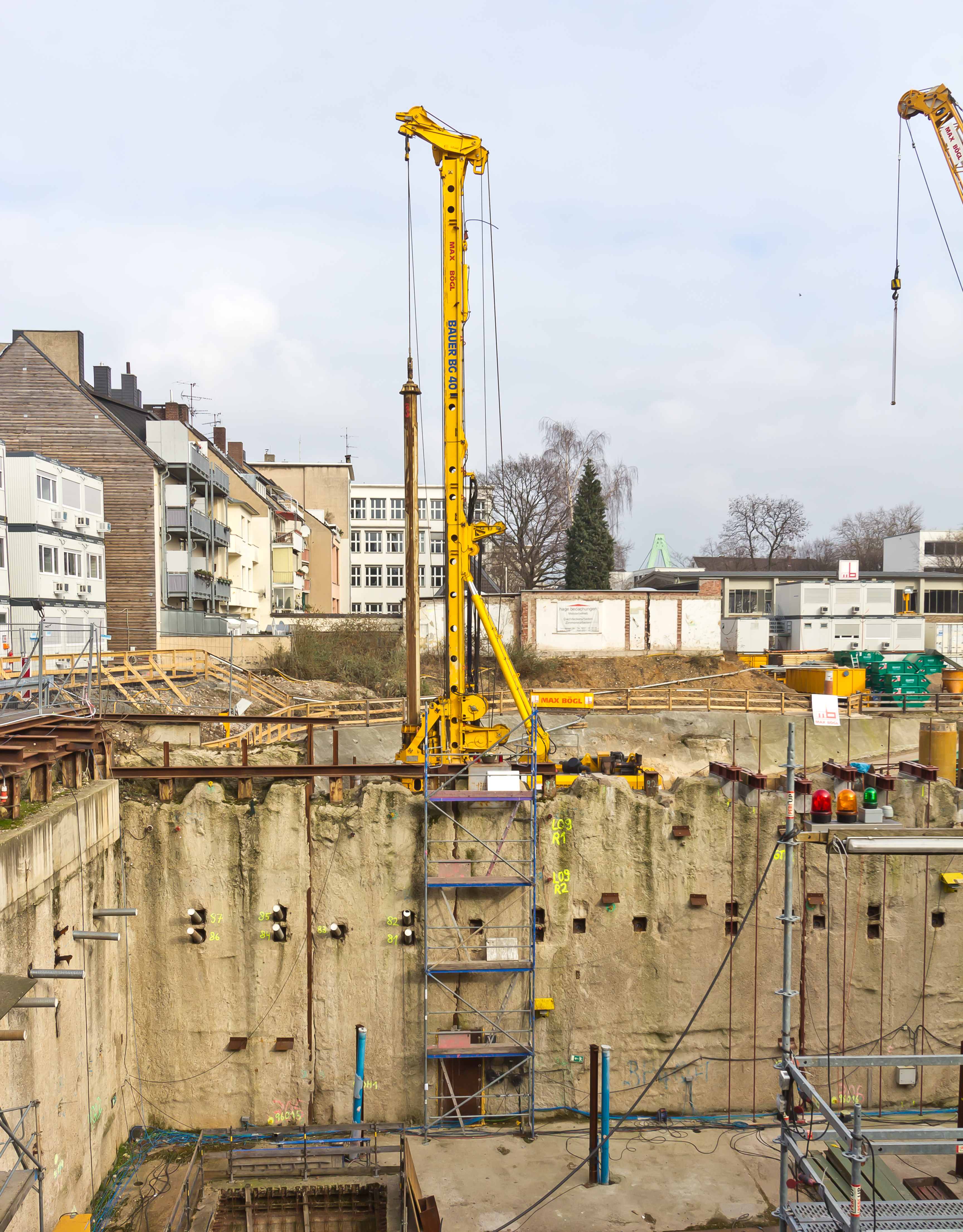 Bau des Besichtigungsbauwerks zur Erforschung der Einsturzursache des Historischen Archivs der Stadt Köln am 3. März 2009 Foto: Vordergrund: Baugrube des Gleiswechselbauwerks, in die das Archivgebäude stürzte. Hintergrund: Ein Bohrpfahlgerät beim Errichten das Besichtigungsbauwerk. In der Mitte ist die vermutlich schadhafte Schlitzwand zu sehen.